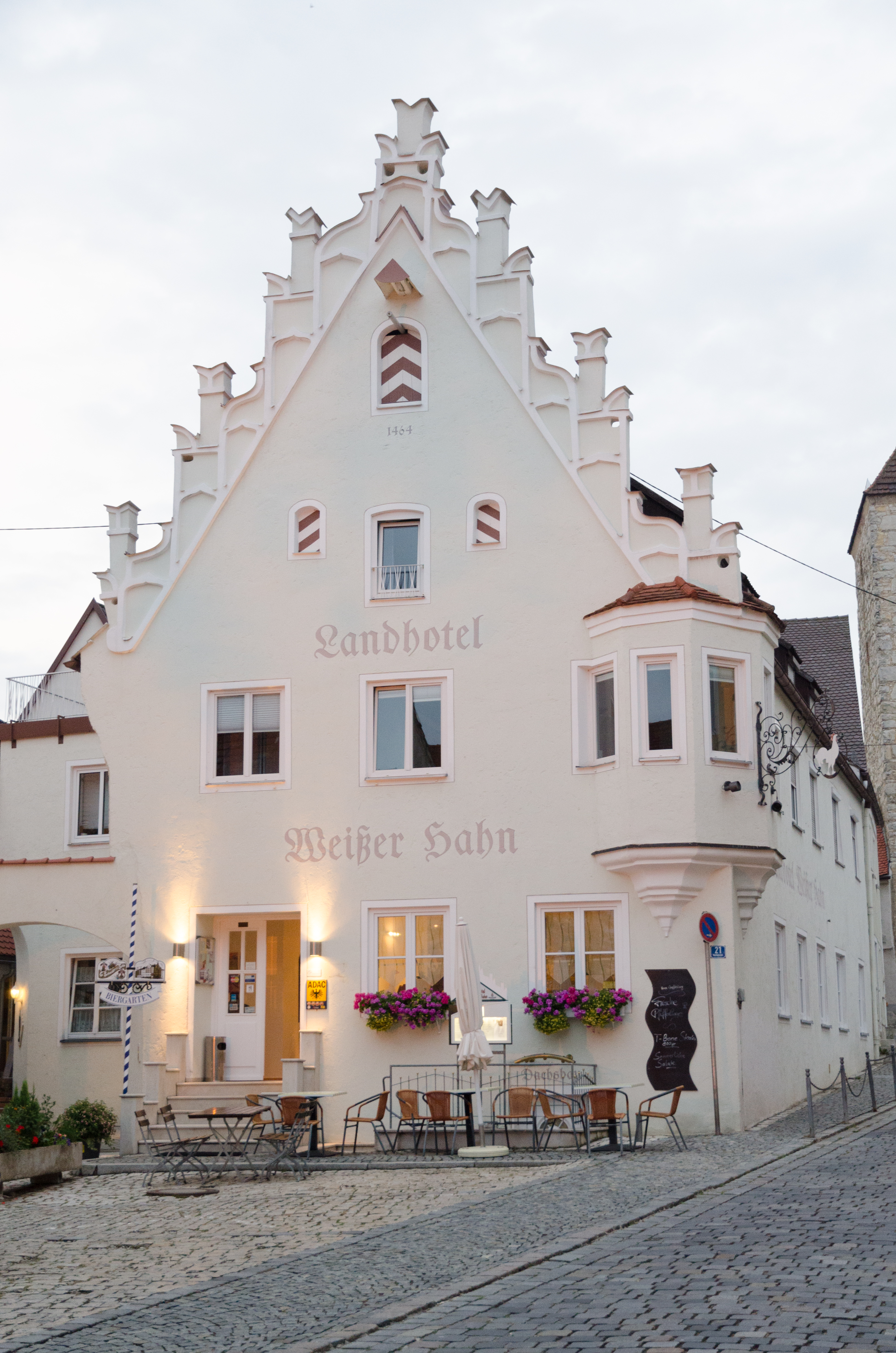 Wemding, Wallfahrtsstraße 21